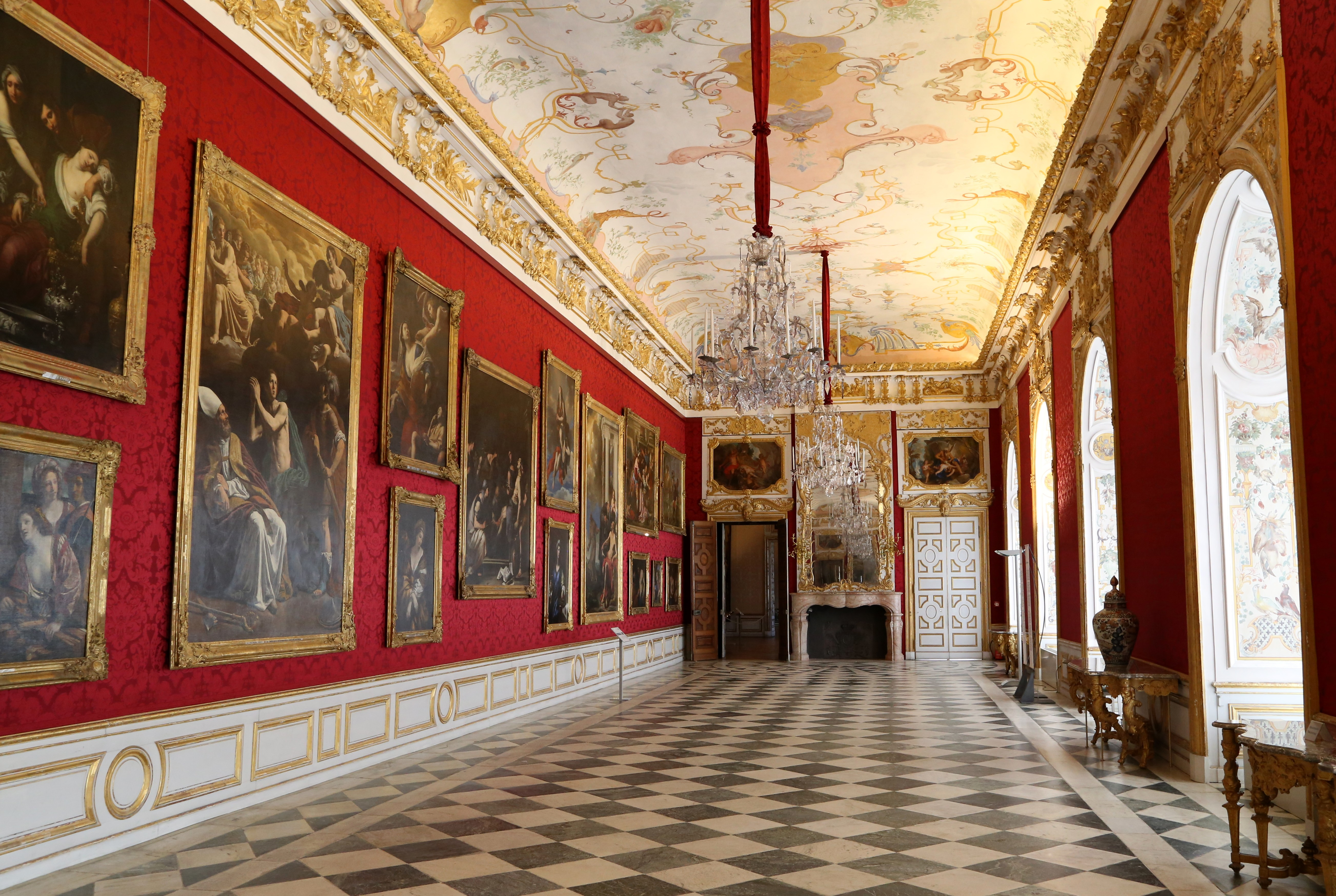 Große Galerie, Neues Schloss Schleißheim